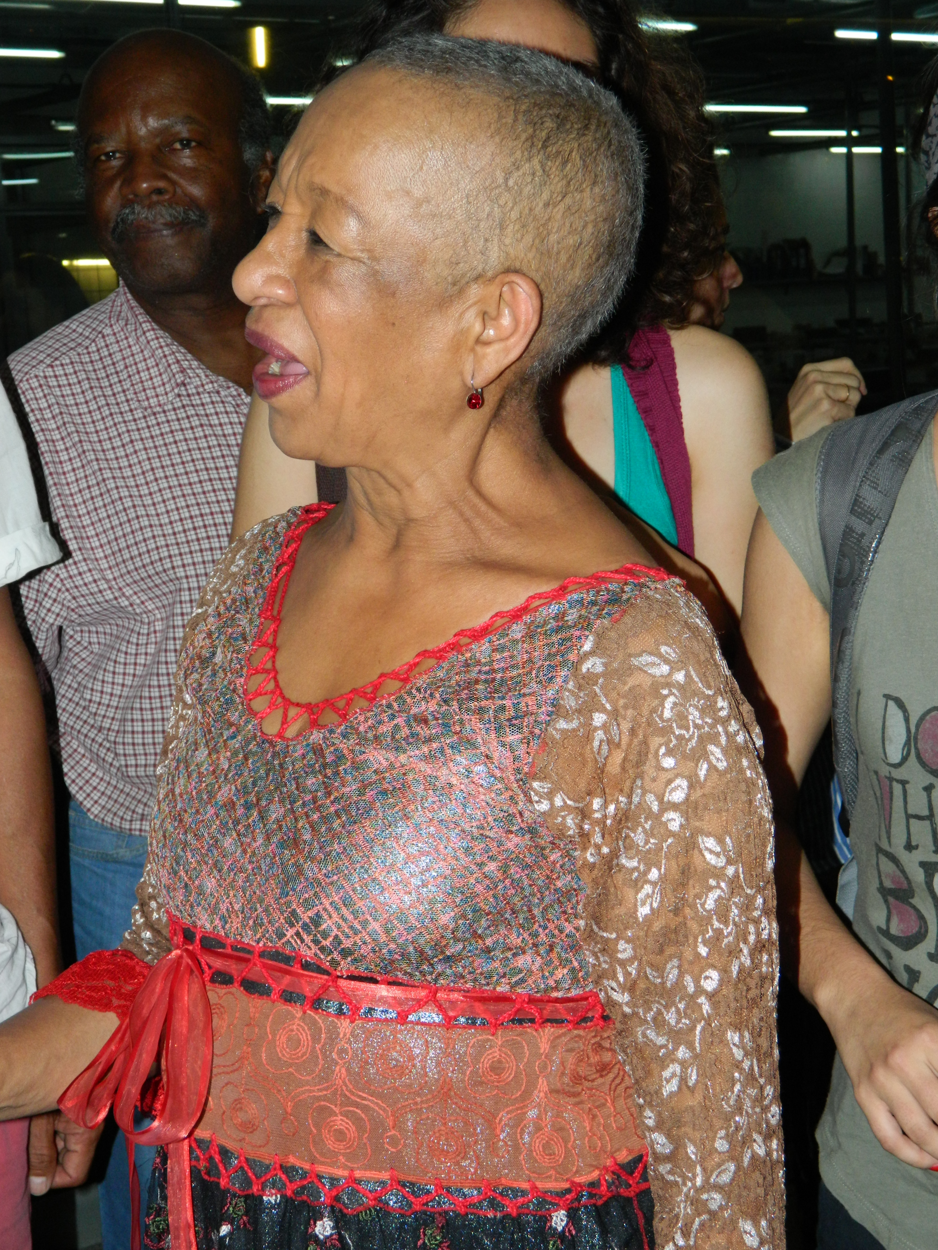 Fotografía tomada a la maestra Teresita Gómezen Medellín, Colombia en el homenaje por su vida artistica el 31/01/2013